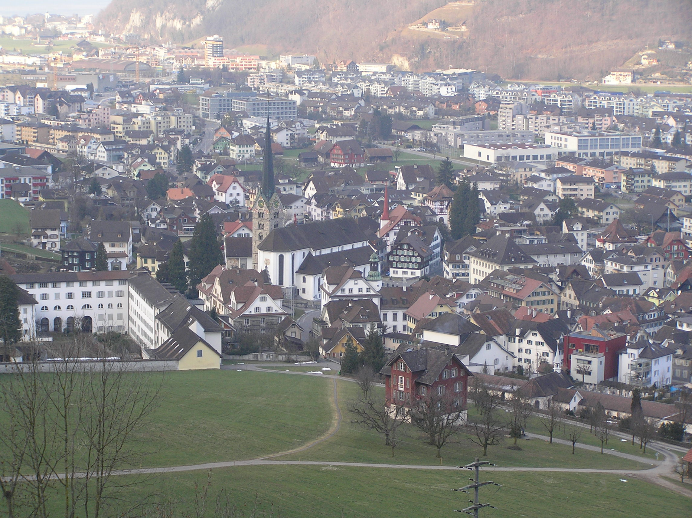 Ortsmitte von Stans (Nidwalden) mit der Pfarrkirche und dem Dorfplatz, aufgenommen vom Fuße des Stanserhorns